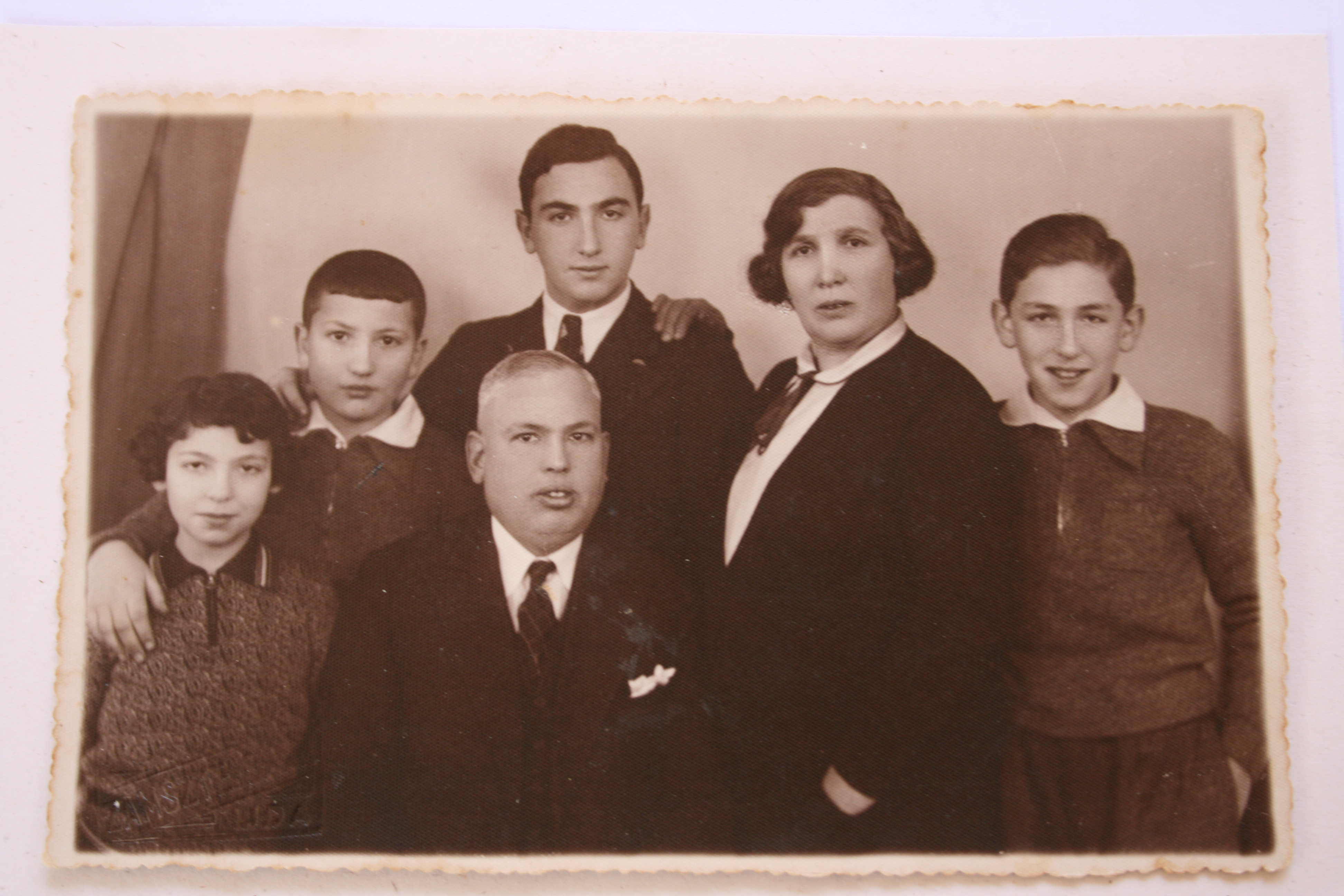 משפחתו של זאב איבינסקי